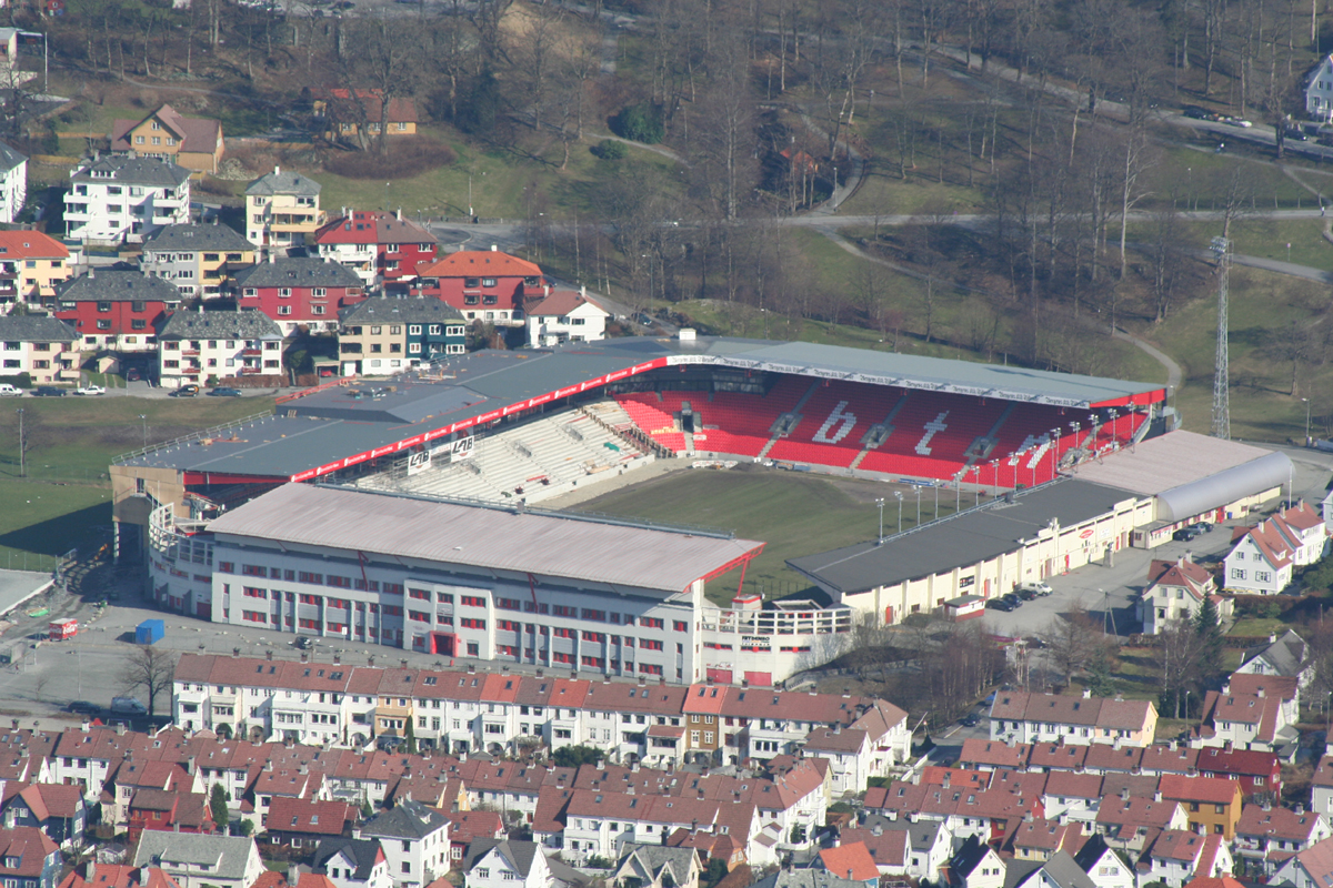 S.K. Brann's stadium Brann stadion